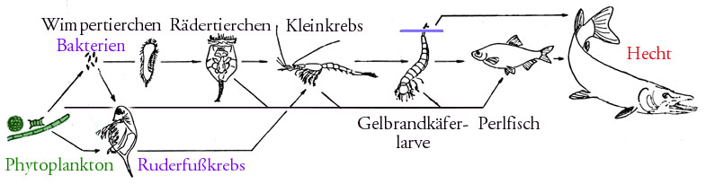 Nahrungsnetz See 2